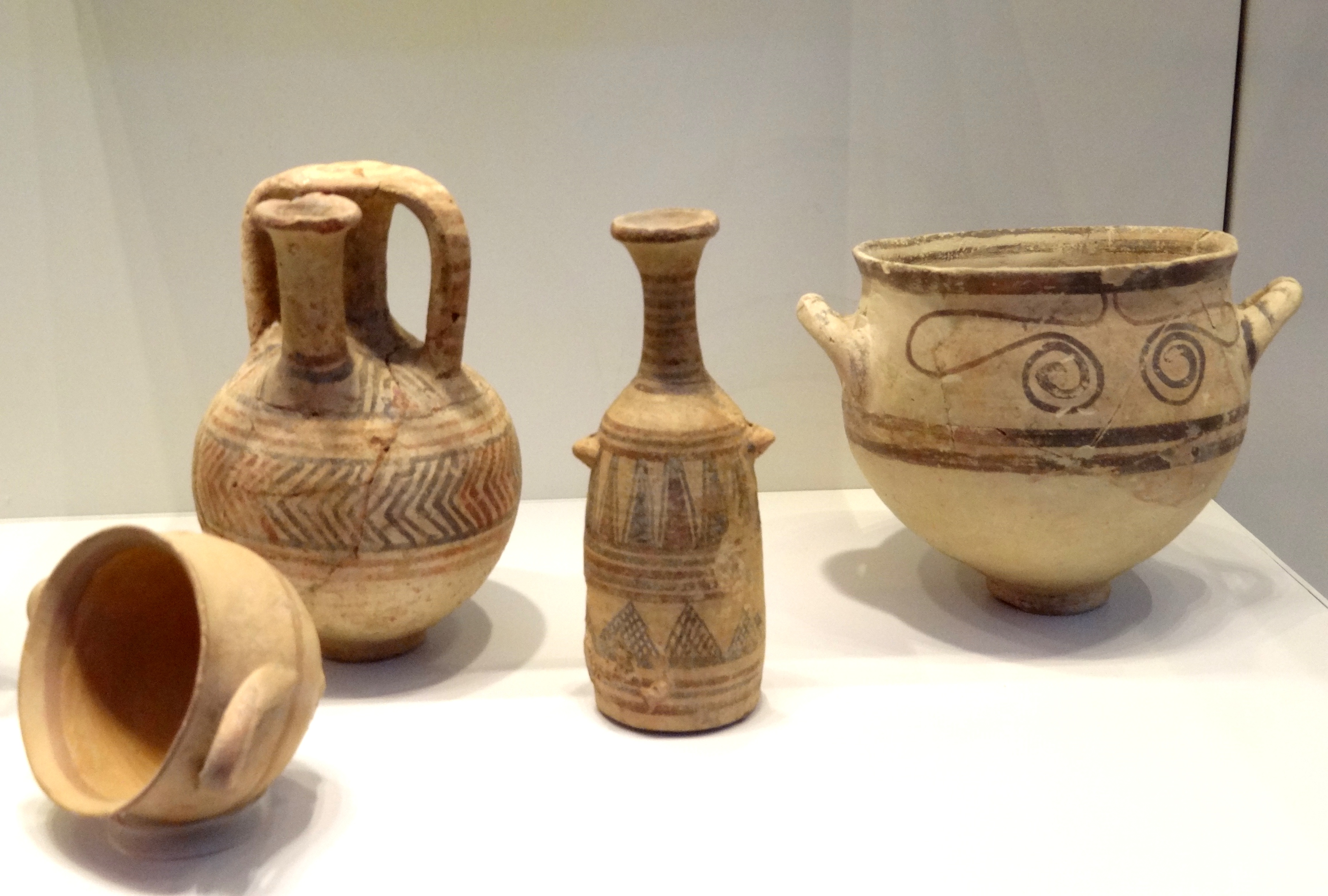 Philistine pottery קרמיקה פלשתית, מימין לשמאלקערת שתייה מהמאה ה-12 לפני הספירה מתל מקנה (עקרון), בקבוק יין, מאזור, המאה ה-12 לפני הספירה, פך ארכוב מאזור וקערית מעקרון תל מקנה, שניהם מאזור המאה ה-12 עד ה-11 לפני הספירה